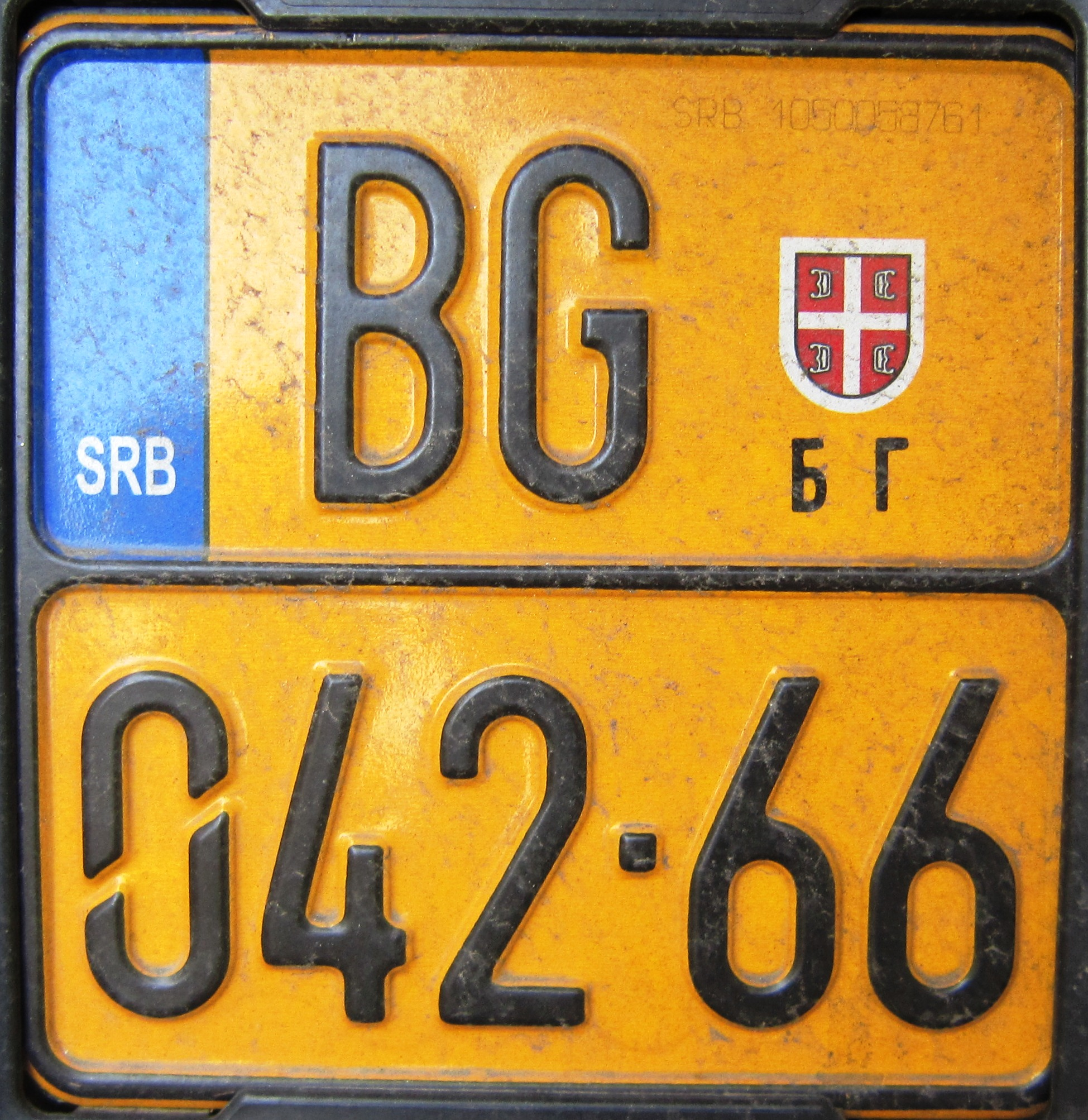 Servië kentekenplaat langzaam vereer Belgrado